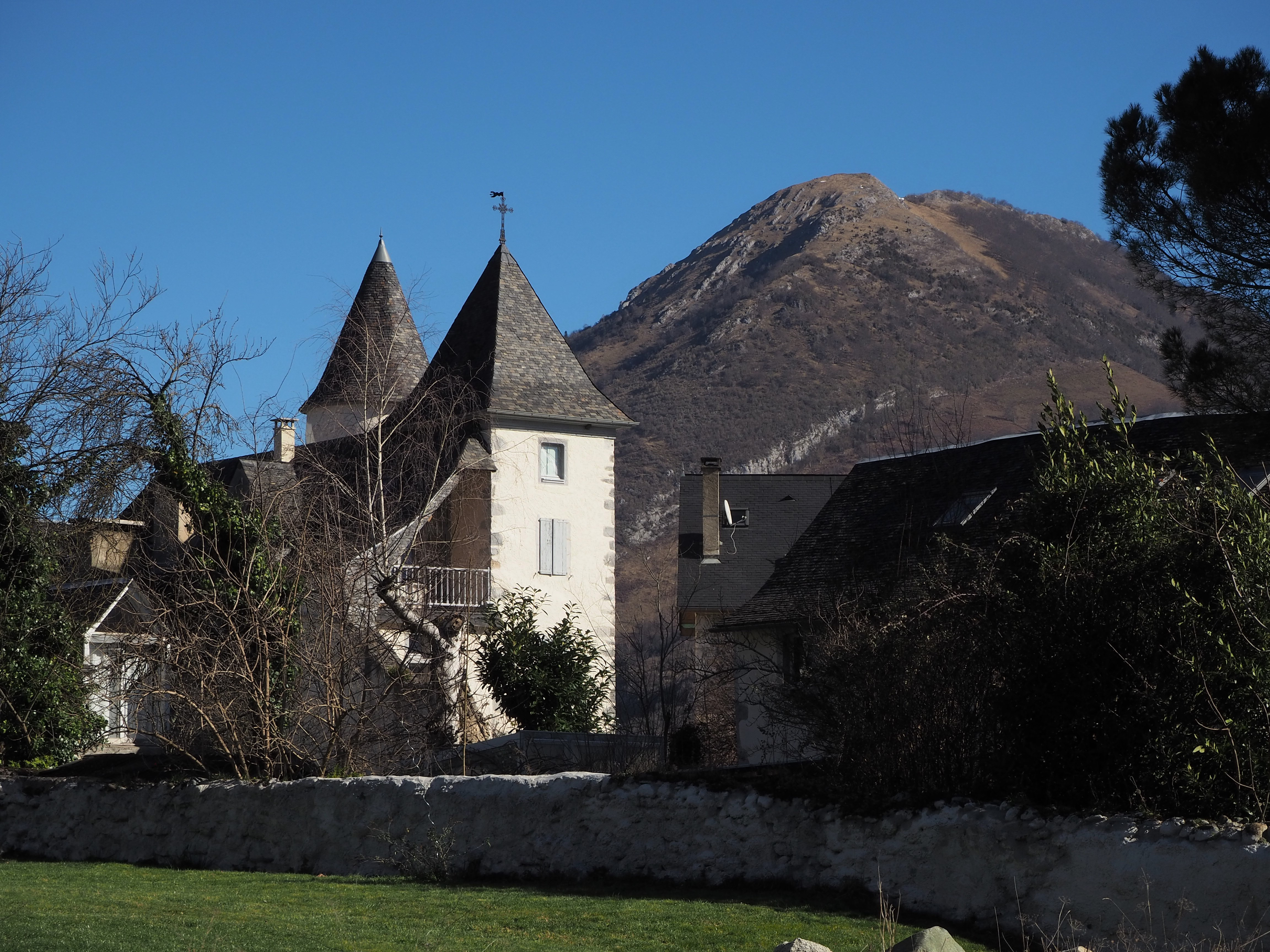 Village de Bielle.